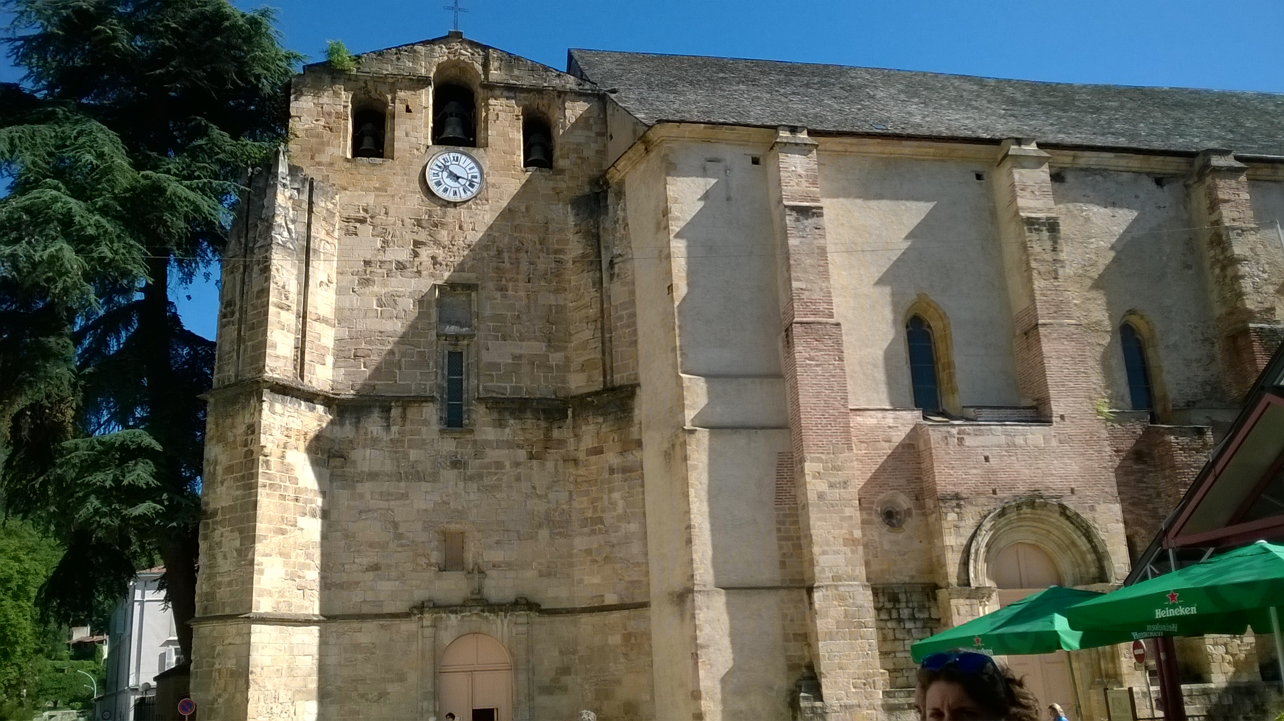 Tour-clocher et flanc sud de l'abbatiale Saint-Volusien de Foix (09).